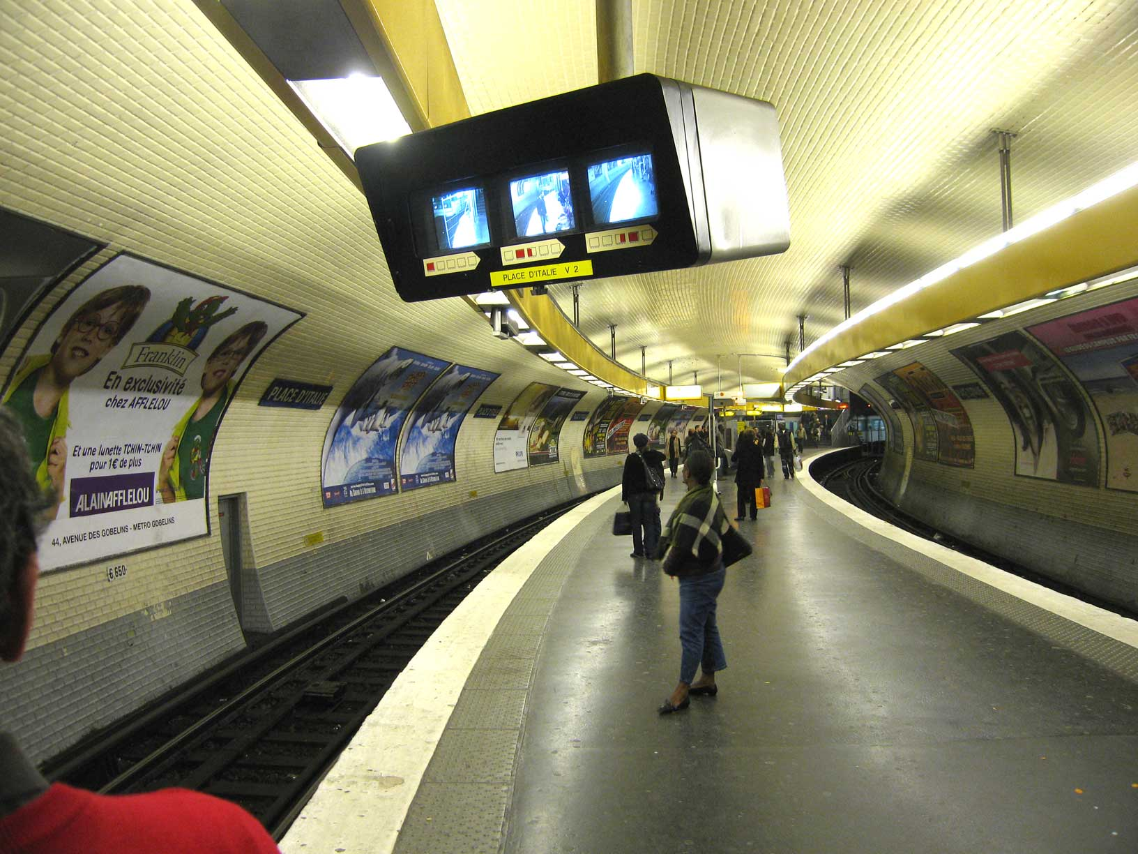 Métro de Paris, Station Place d'Italie (ligne 5), Paris, France